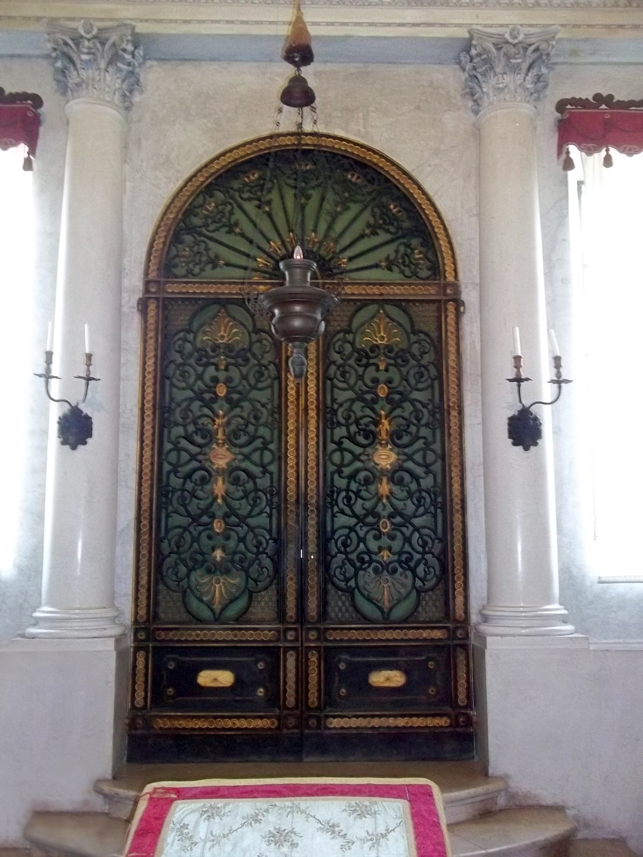 La sinagoga di Soragna, edificata nel 1855 in stile neoclassico, si trova all'interno di un palazzo seicentesco in via Cavour 43. La tipologia è quella delle sinagoghe dell'epoca precedente all'emancipazione, prive di segni distintivi esterni, riccamente decorate all'interno.